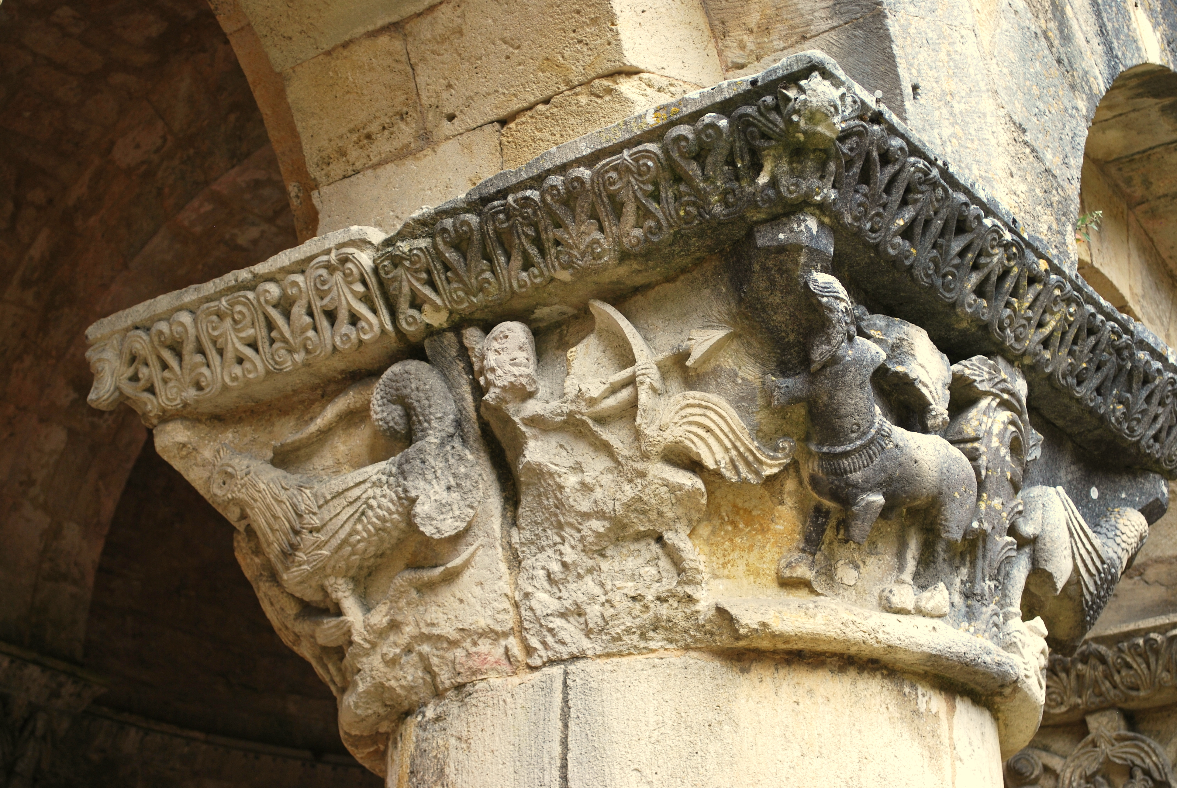 Abbaye de la Sauve-Majeure